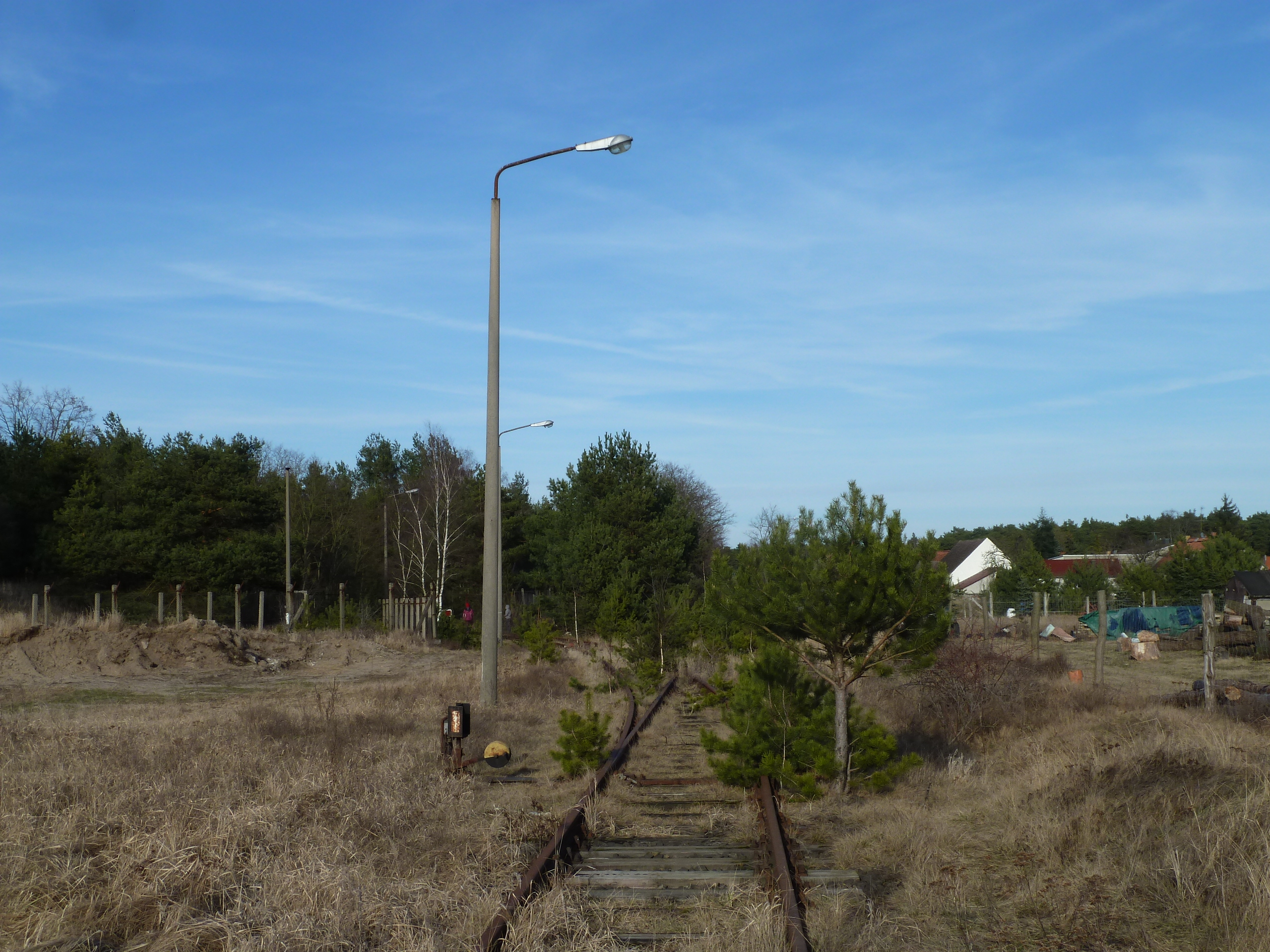 Bahnhof Bücknitz, ehemaliger Anschluss zum Quelle-Lager. Er steht auf der Denkmalliste des Landes BrandenburgUnknown rail relics in bücknitz, cultural heritage